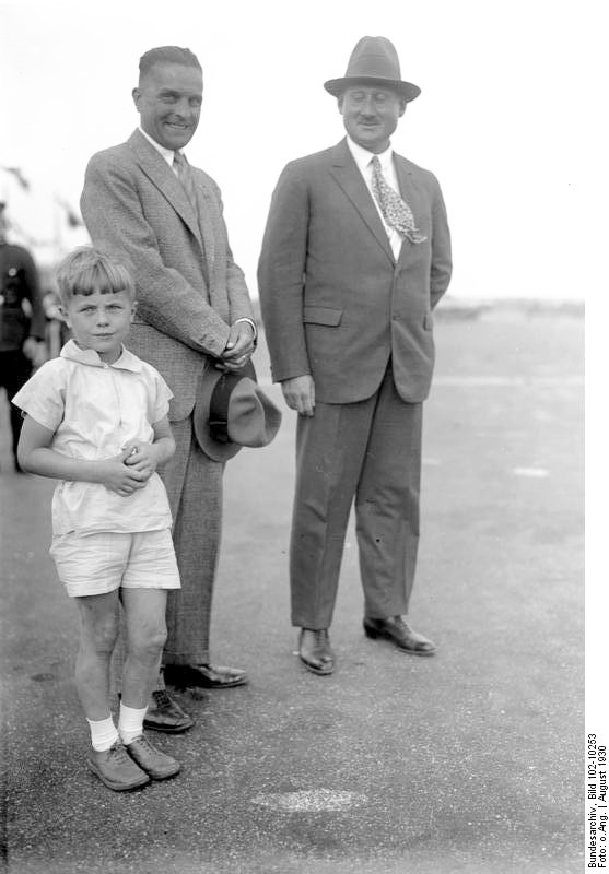 Deutschland siegreich im Europa-Rundflug! Der deutsche Pilot Morzik, der Sieger des vorjährigen Europa-Fluges und auch in diesem Jahre den Sieg davontrug.